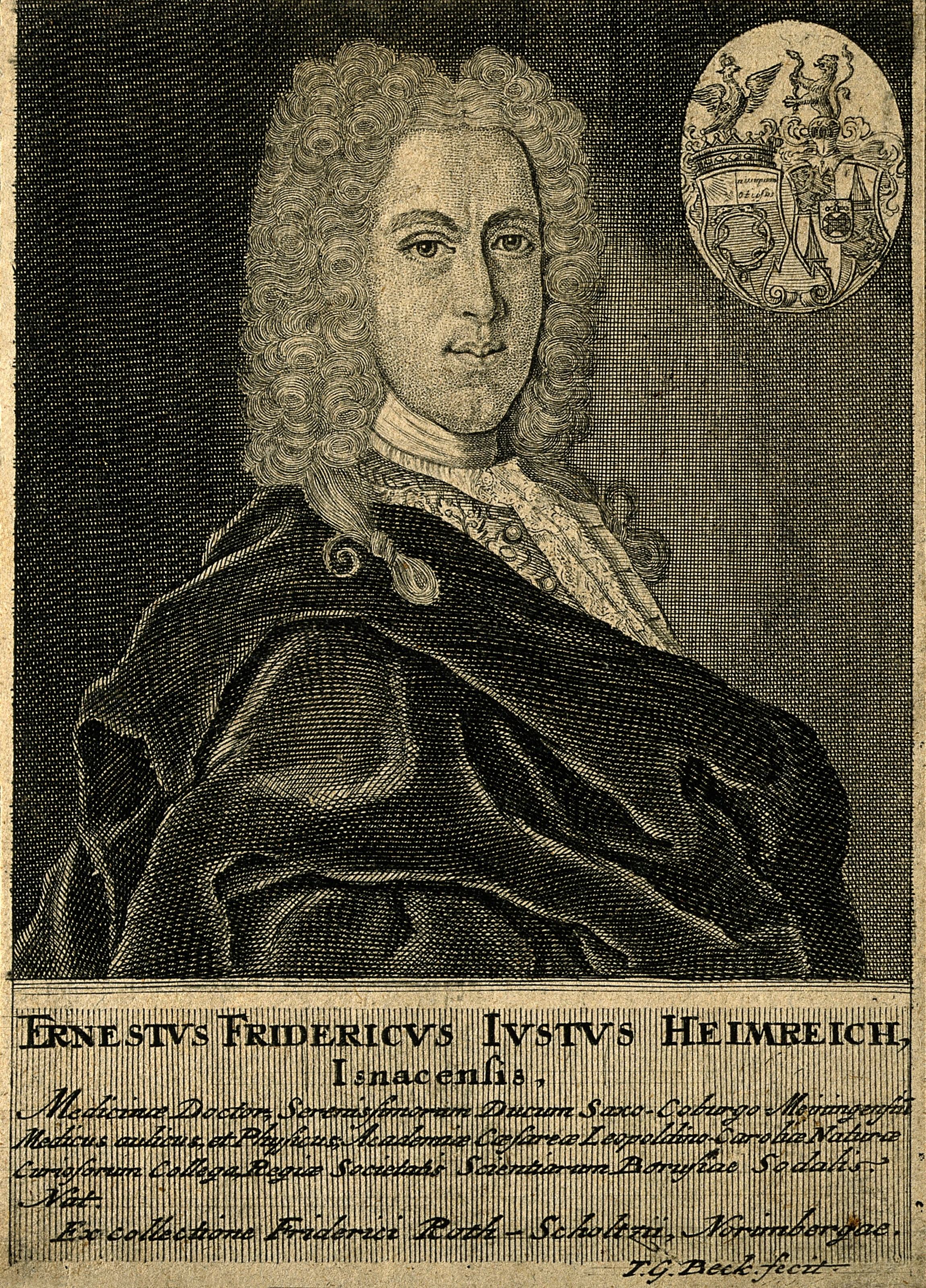 Ernst Friedrich Justus Heimreich. Line engraving by T. G. Beck after I. Leopold. Iconographic Collections Keywords: portrait prints; engravings; Ernst Friedrich Justus Heimreich